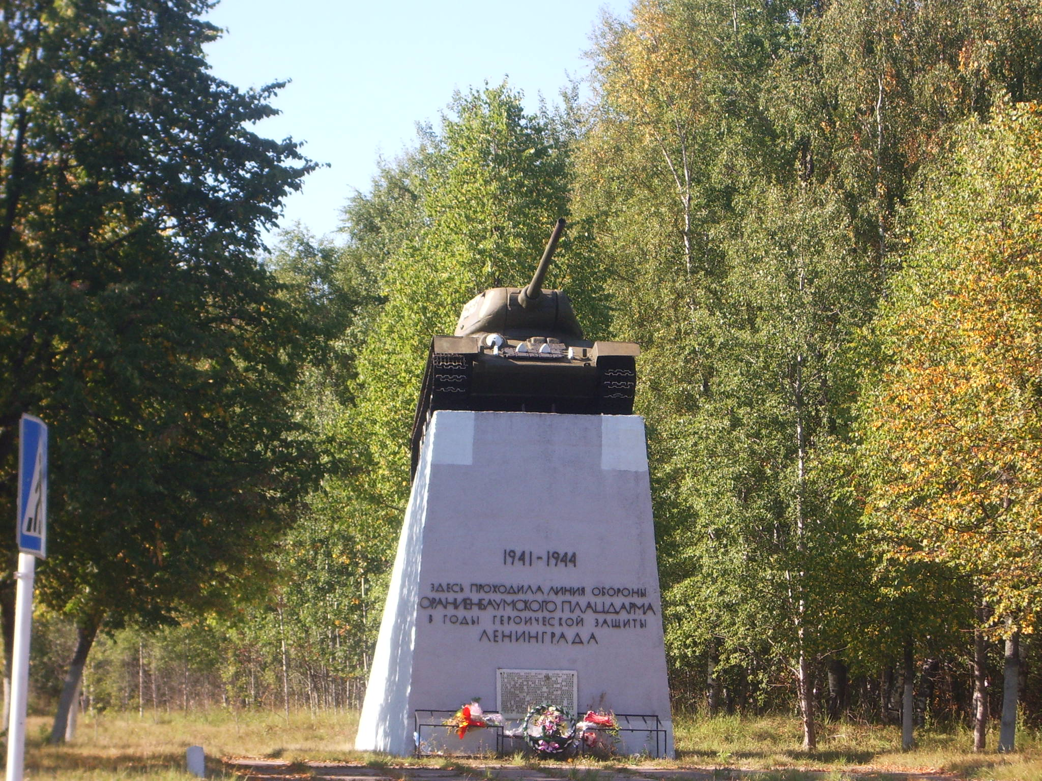 Зеленый Пояс Славы - Ораниенбаумский плацдарм - Атака